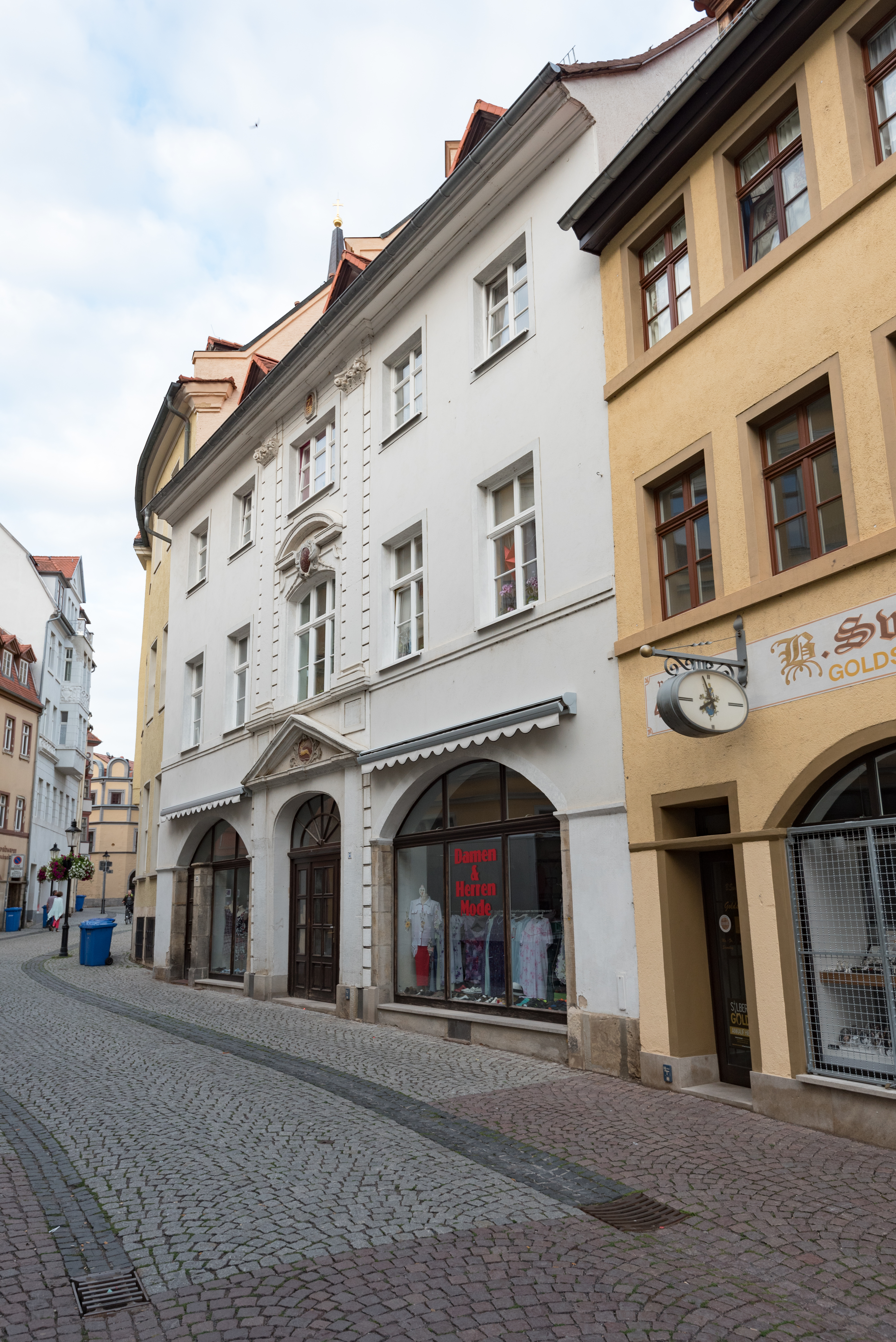 Naumburg (Saale), Salzstraße 43